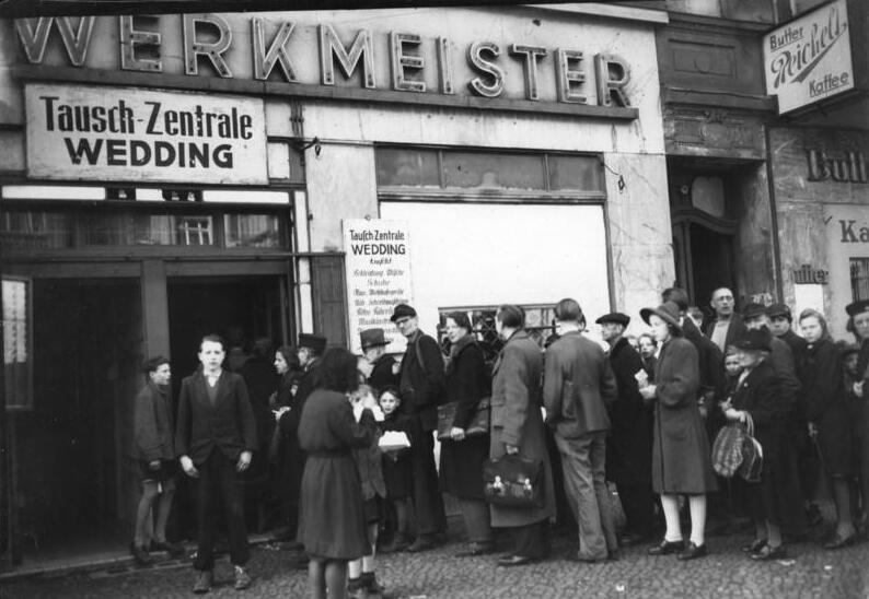 Berlin-Wedding, Tauschzentrale Illus- Bittner Berlin 1947, Andrang zur Tauschzentrale im Bezirk Wedding 492-47